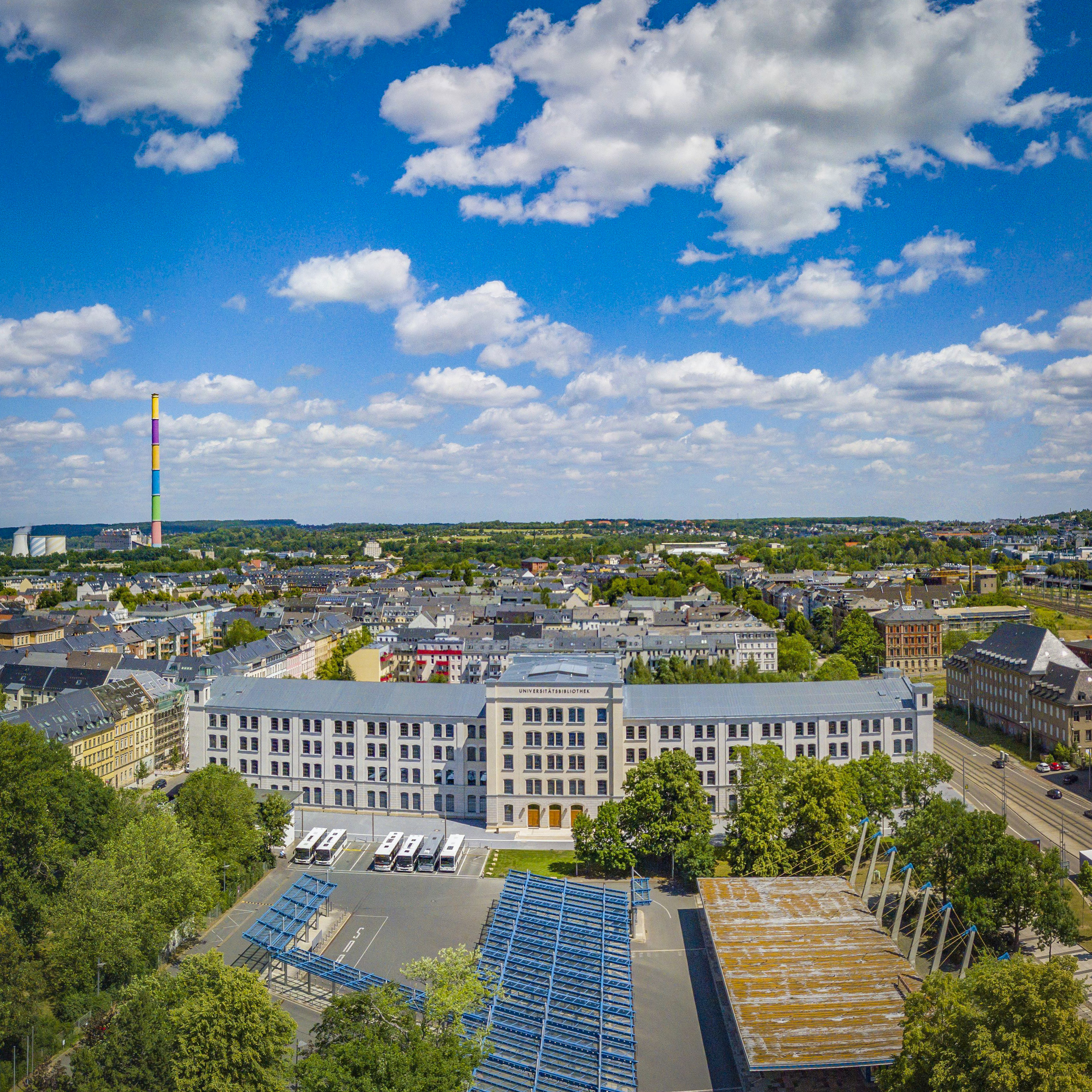 Universitätsbibliothek Chemnitz in der Alten Aktienspinnerei